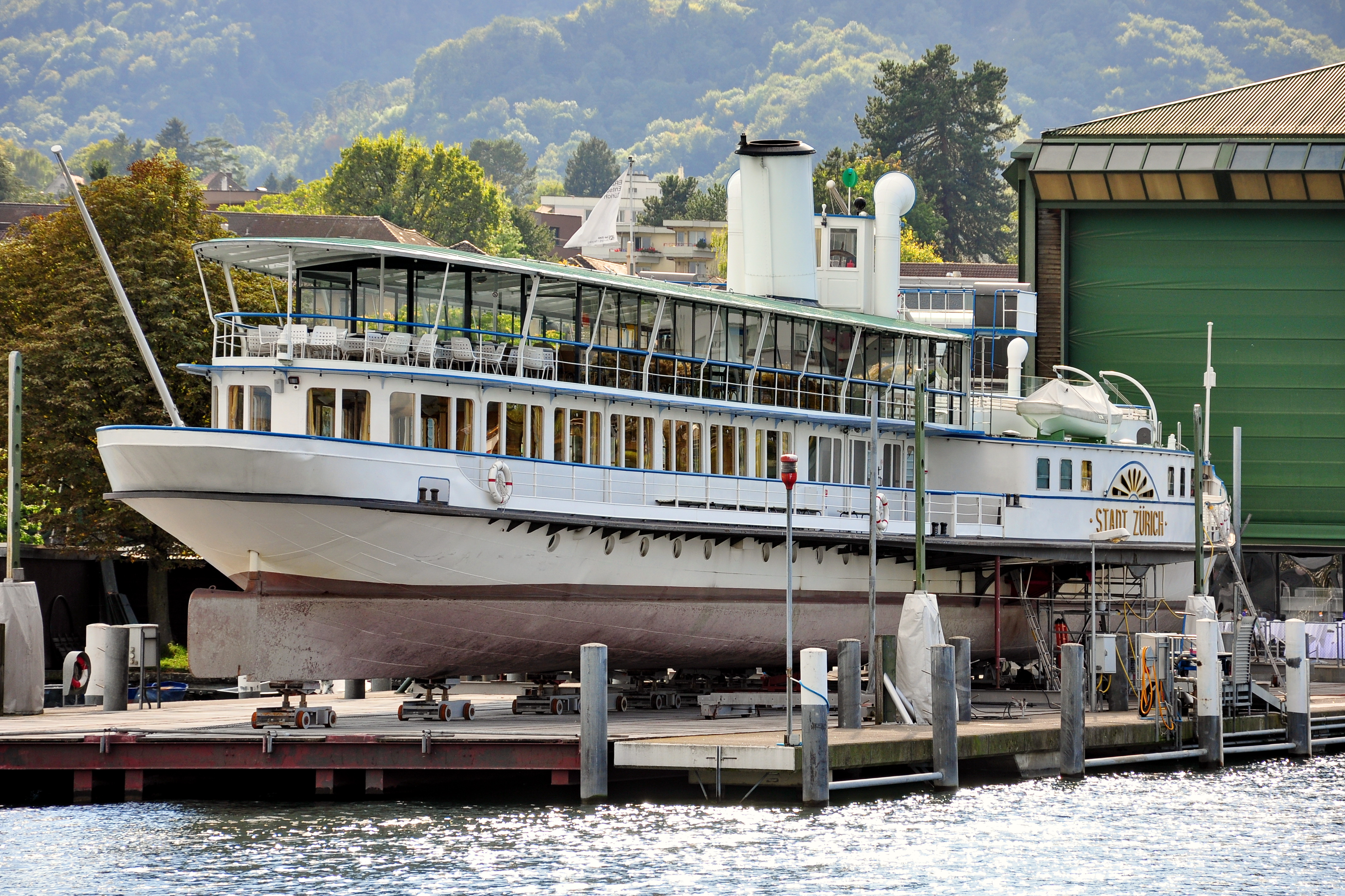 Zürichsee-Schiffahrtsgesellschaft (ZSG) paddle steamship Stadt Zürich at the ZSG shipyard in Zürich-Wollishofen, as seen from paddle steamship Stadt Rapperswil on Zürichsee towards Bürkliplatz in Zürich (Switzerland)